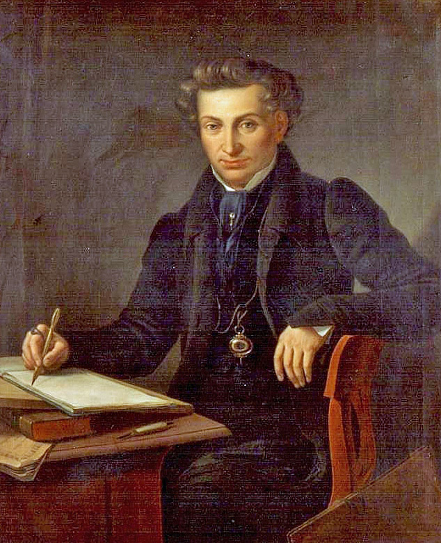 Portrait von Johann Wilhelm Zanders (1795–1831)